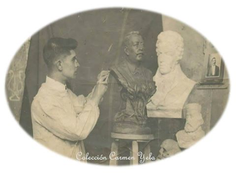 Escultor Rafael Yela Gunther en su juventud.